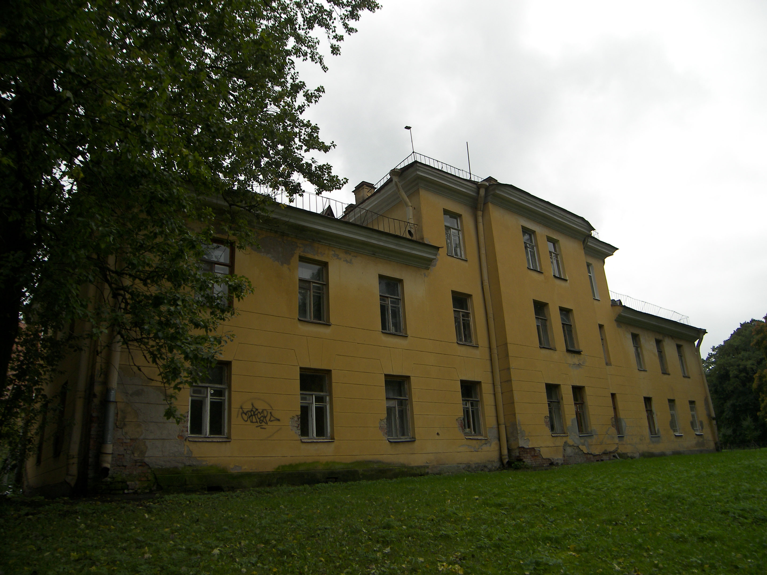 Усадьба П.Г. Демидова. Санкт-Петербург.